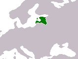 Este archivo fue creado copiando de wikicommons Image:BlankMap-World.png y luego editado en el programa paint. fue hecho por y a la hora--Mexicano 18:35 23 abr 2006 (CEST)